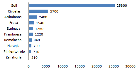 Comparación de antioxidantes que contienen algunos alimentos